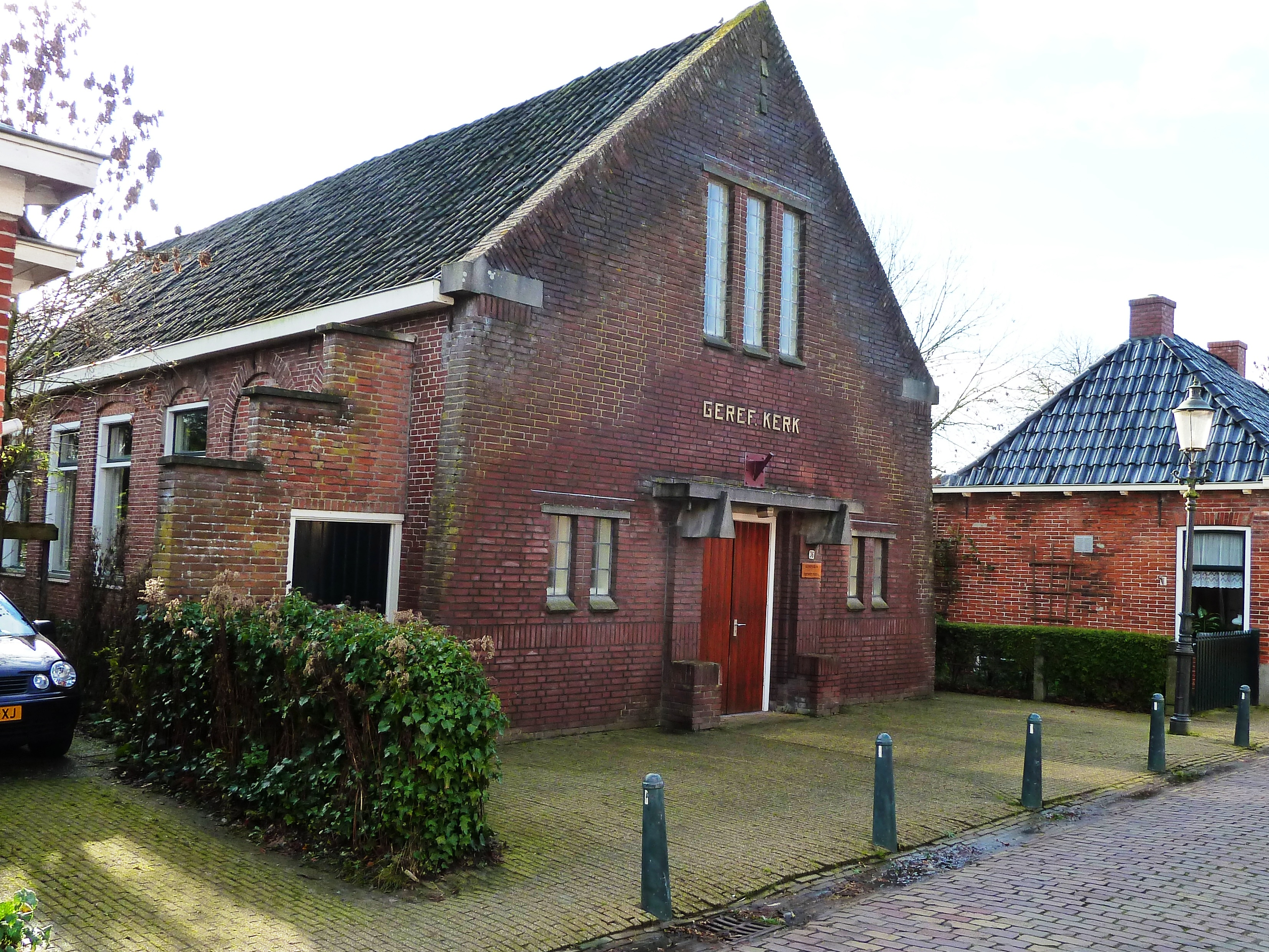 Gereformeerde kerk van Visvliet.